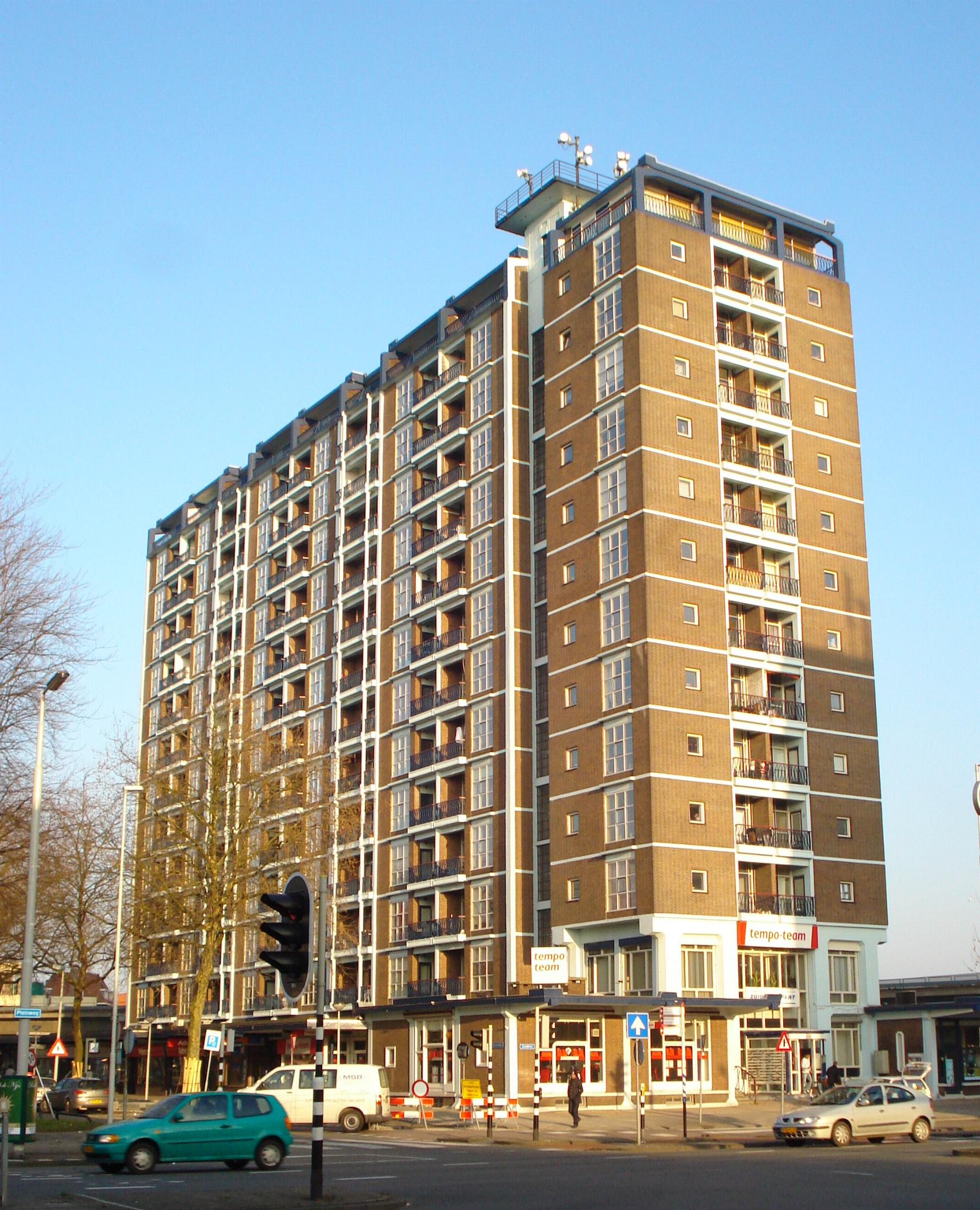 Rotterdam, Zuidpleinflat. Voorgedragen als rijksmonument, oktober 2007.